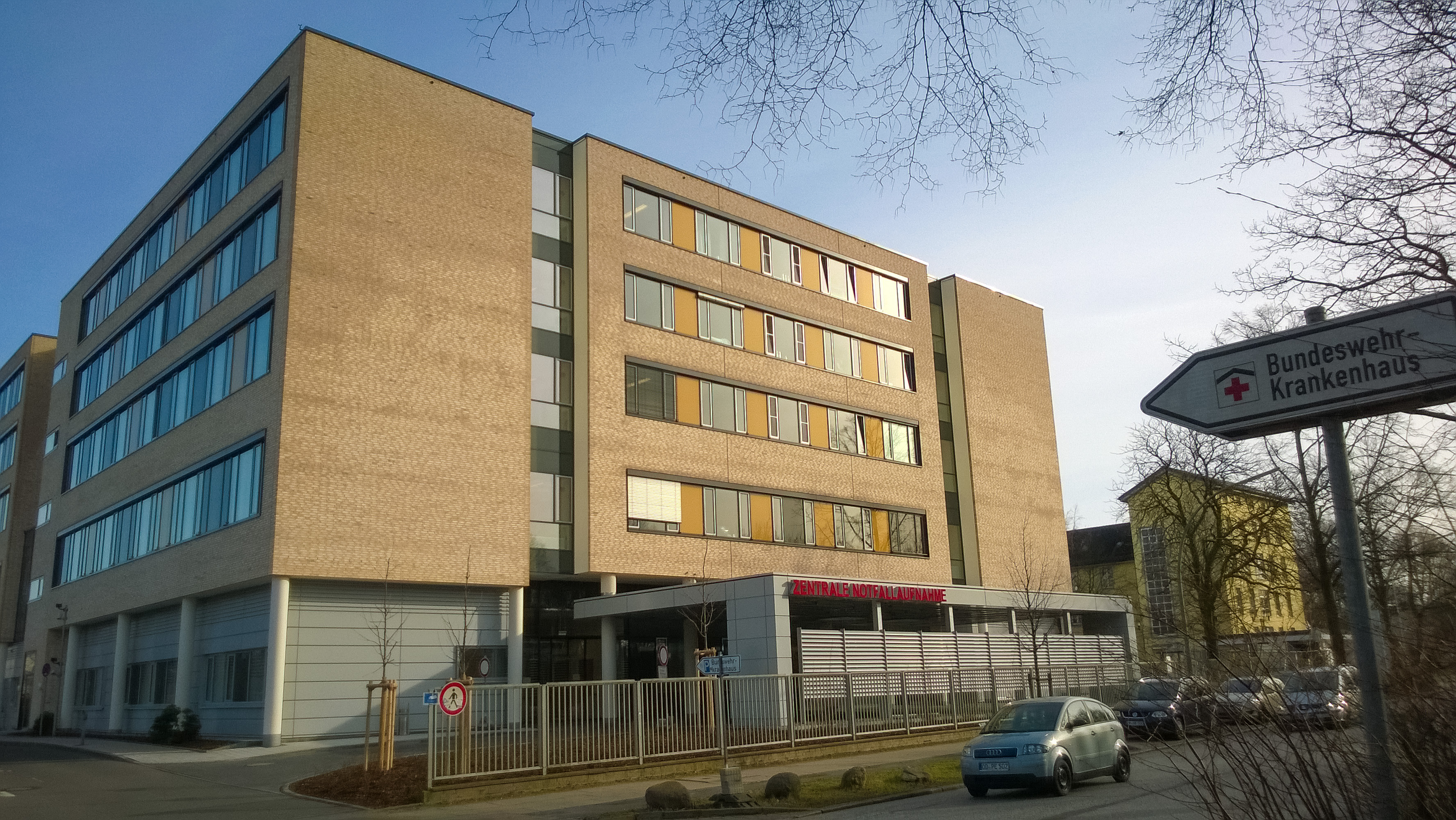 Foto des Neubaus des BWK Hamburg mit der Zentralen Notaufnahme im Vordergrund